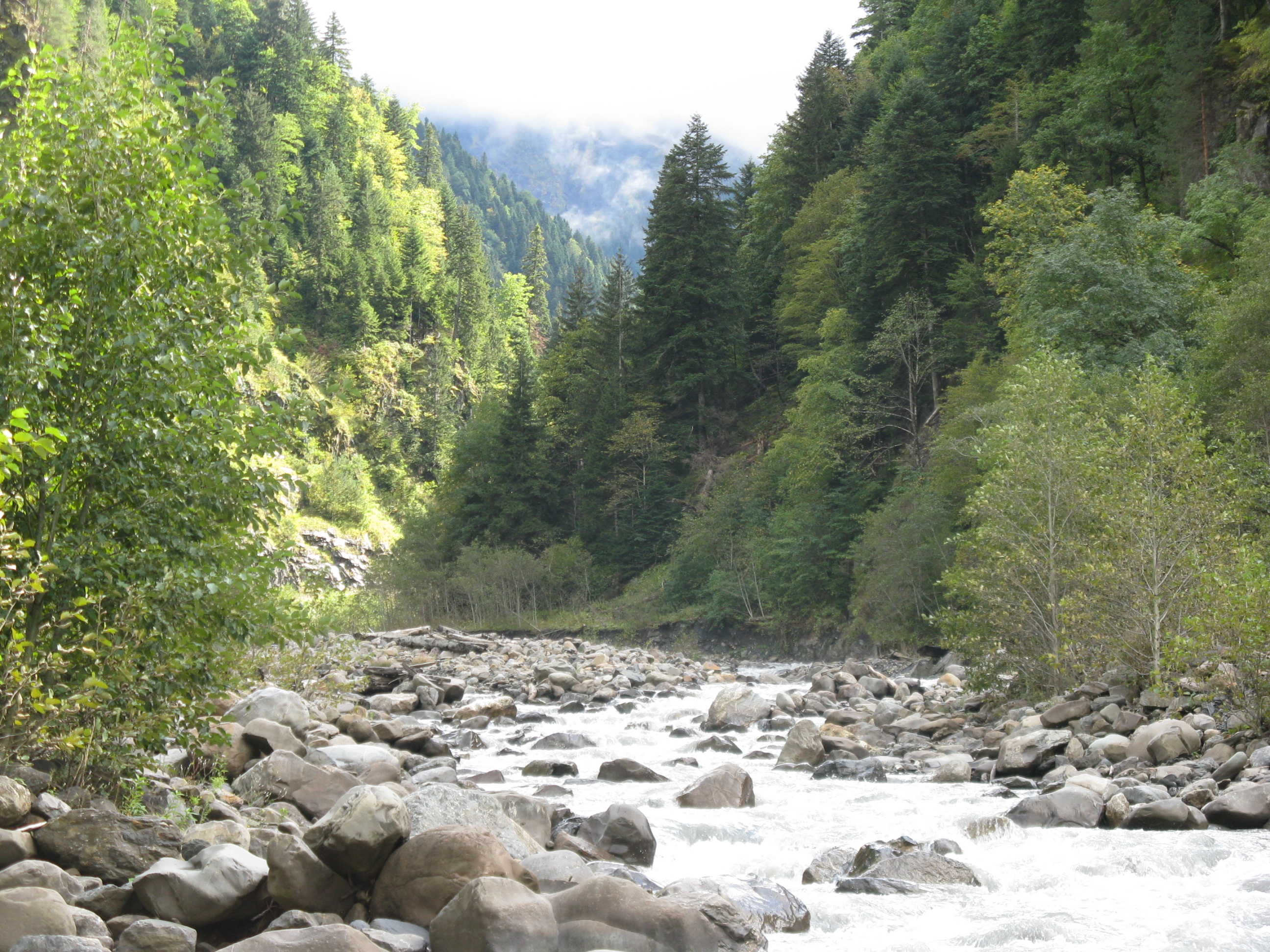 Near Zugdidi river